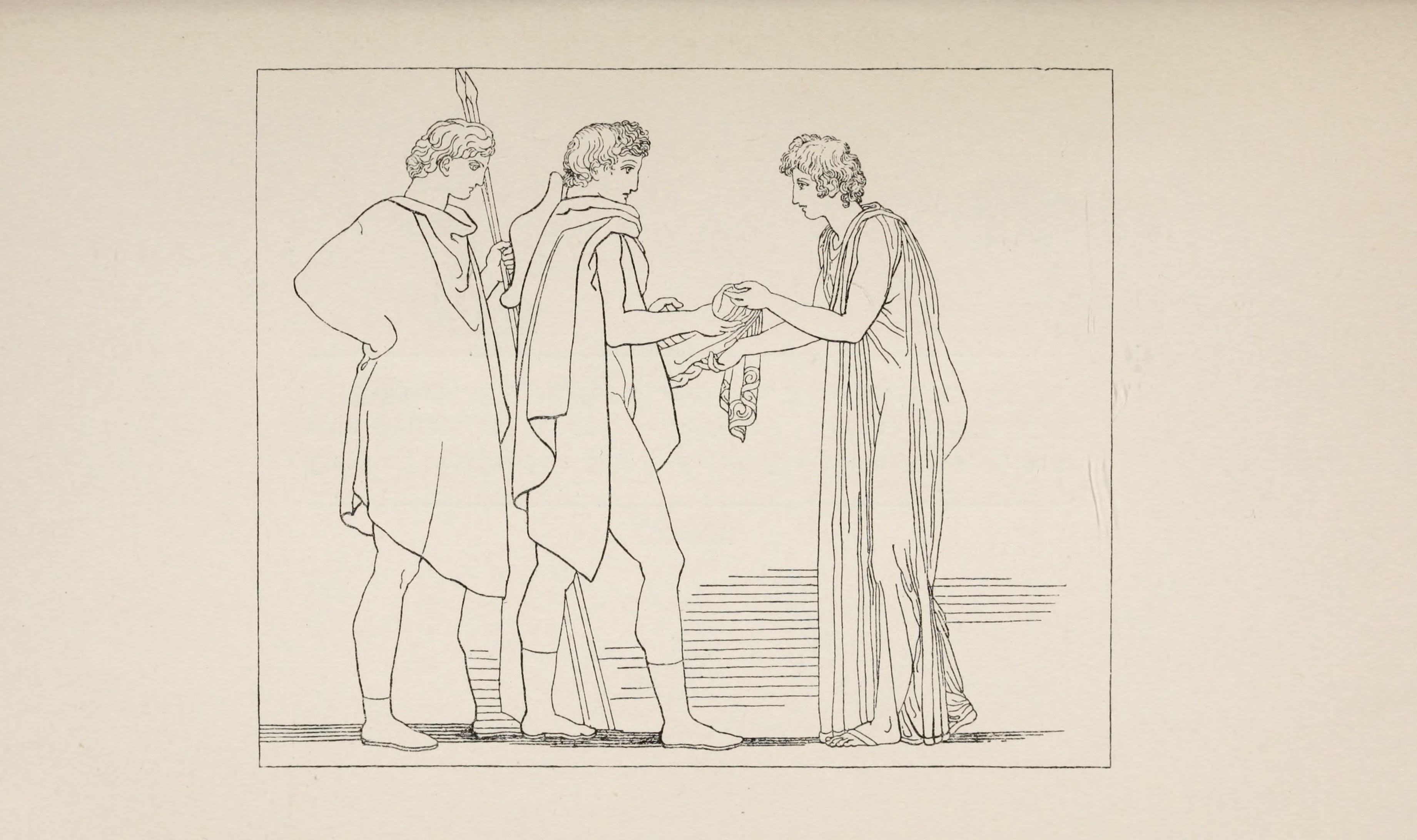 Elektra, den Bruder an einem von ihr gewebten Gewand erkennend. – Äschylos, Choephoren V. 231.